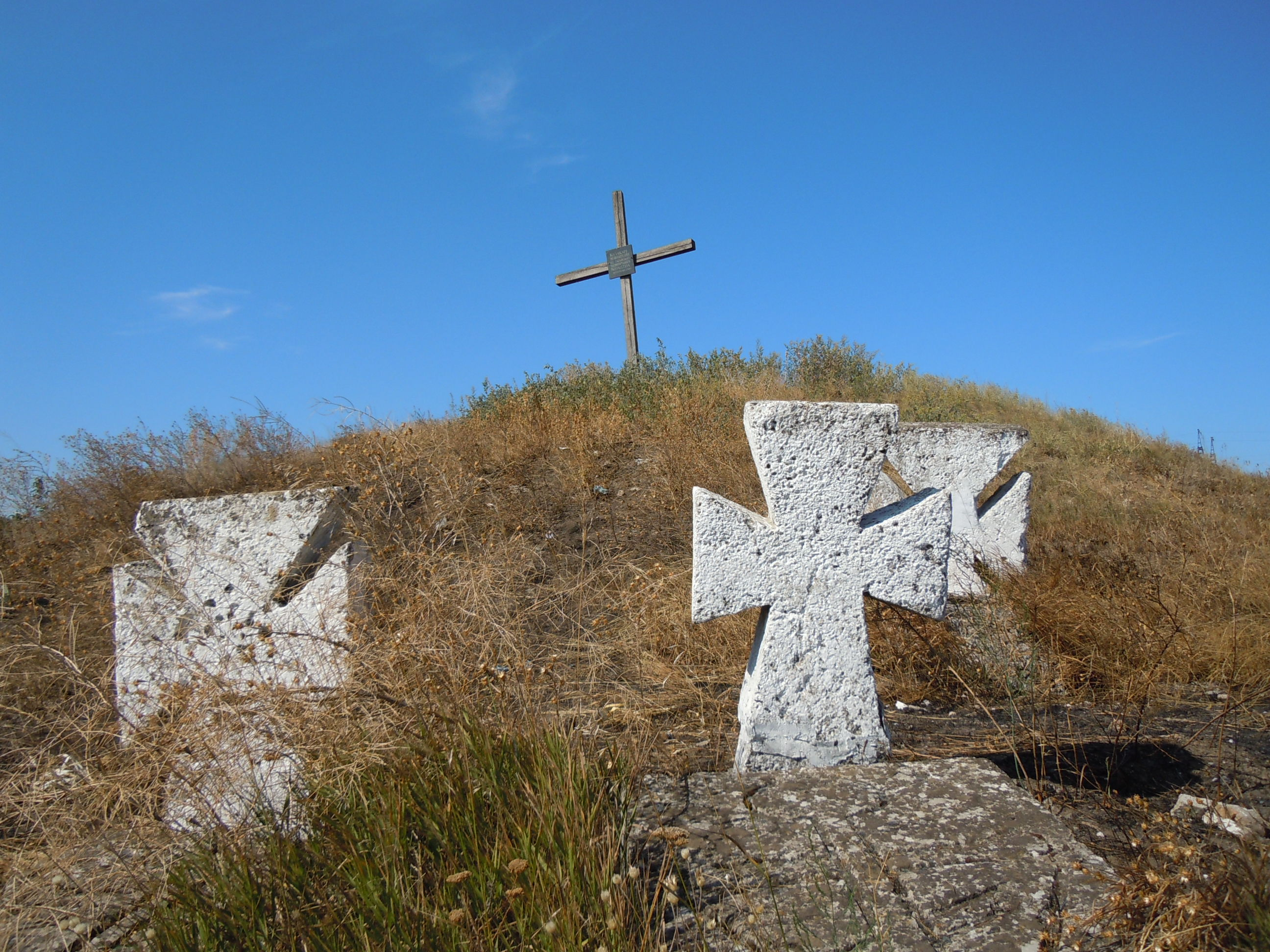 Курган із козацькими могилами на Великому Усатівському цвинтарі